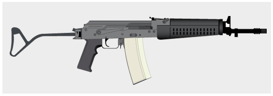 Vectorgrafik des Wieger STG 942 / verkleinerte .jpg-Kopie Andere Versionen: Version 1.0